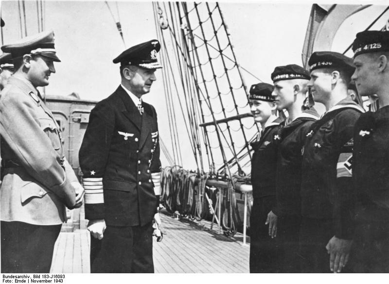 Die Filmschau der Hitlerjugend "Junges Europa" zeigt in ihrer neuen Folge die Sammlung von über 3.000 Schallplatten der Württembergischen Marine-HJ für unsere U-Bootfahrer. Eine hohe Ehrung für die eifrigen Sammler war ihre Begrüssung durch den Oberbefehlshaber der Kriegsmarine, Grossadmiral Dönitz, und Reichsjugendführer Axmann an Bord des Segelschulschiffes "Horst Wessel". Bei Abdruck nennen: Scherl Bilderdienst (Emde-RFF), 27.11.1943 [Herausgabedatum]